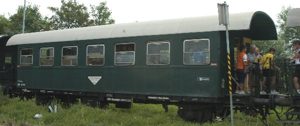 alter Personenwaggon der ÖBB (Bahnhof Langau), Bauart N 28 (kein „Spantenwagen“, nur ähnliches Aussehen einer in den Grundlagen älteren Bauart)